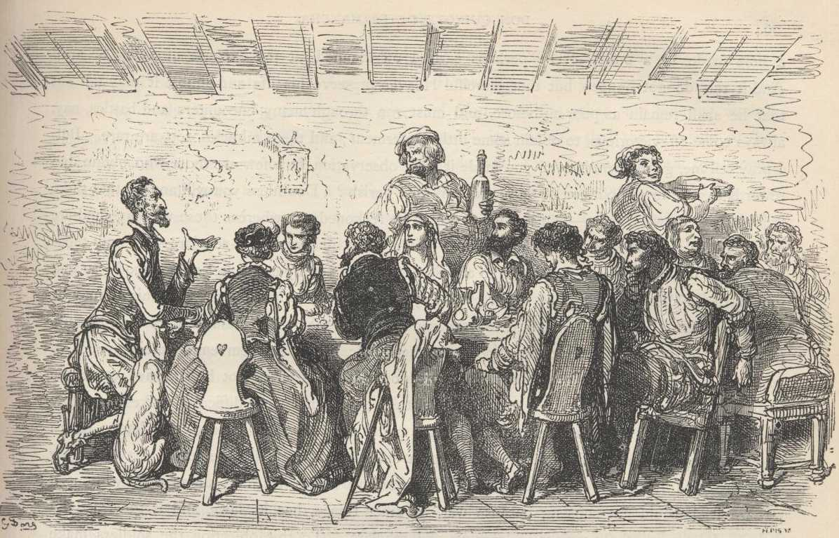 Gustave Doré, ilustração para "Dom Quixote" de Miguel de Cervantes